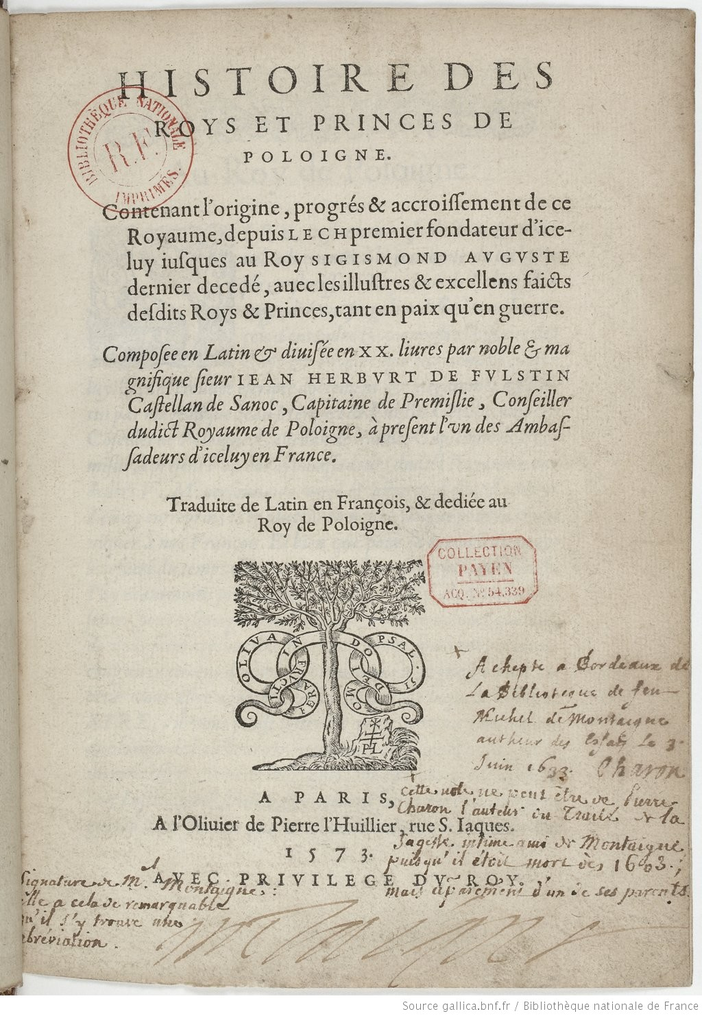 Histoire des roys et princes de Poloigne composée en latin et divisée en XX livres par Jean Herburt de Fulstin Traduite de latin en françois [par Fr. Bauduin]